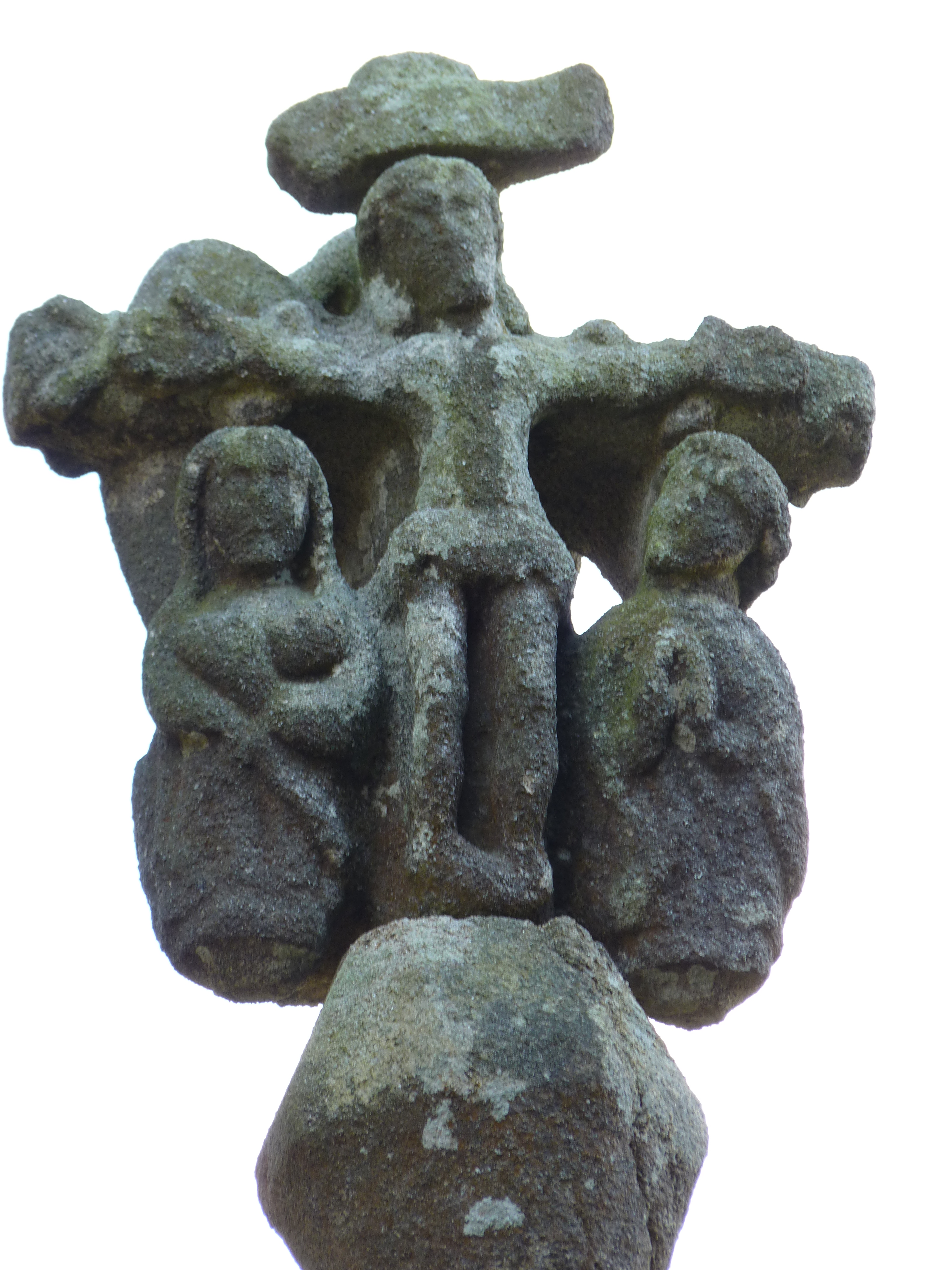 Croix du 17ème siècle